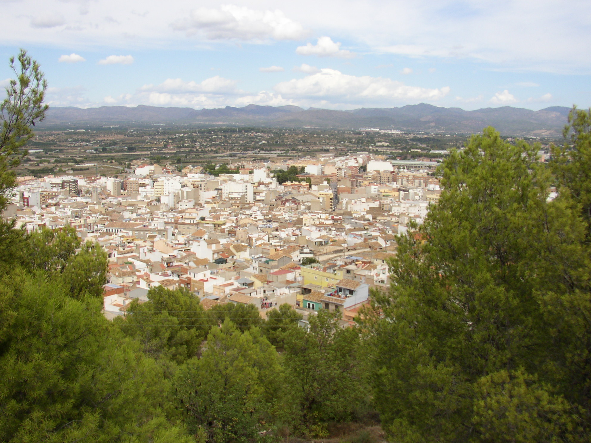 Valencia. (Comunidad Valenciana. España) Liria. Vista general desde San Miguel. Fotografía realizada el 24 septiembre de 2006 por el autor. User:Pelayo2